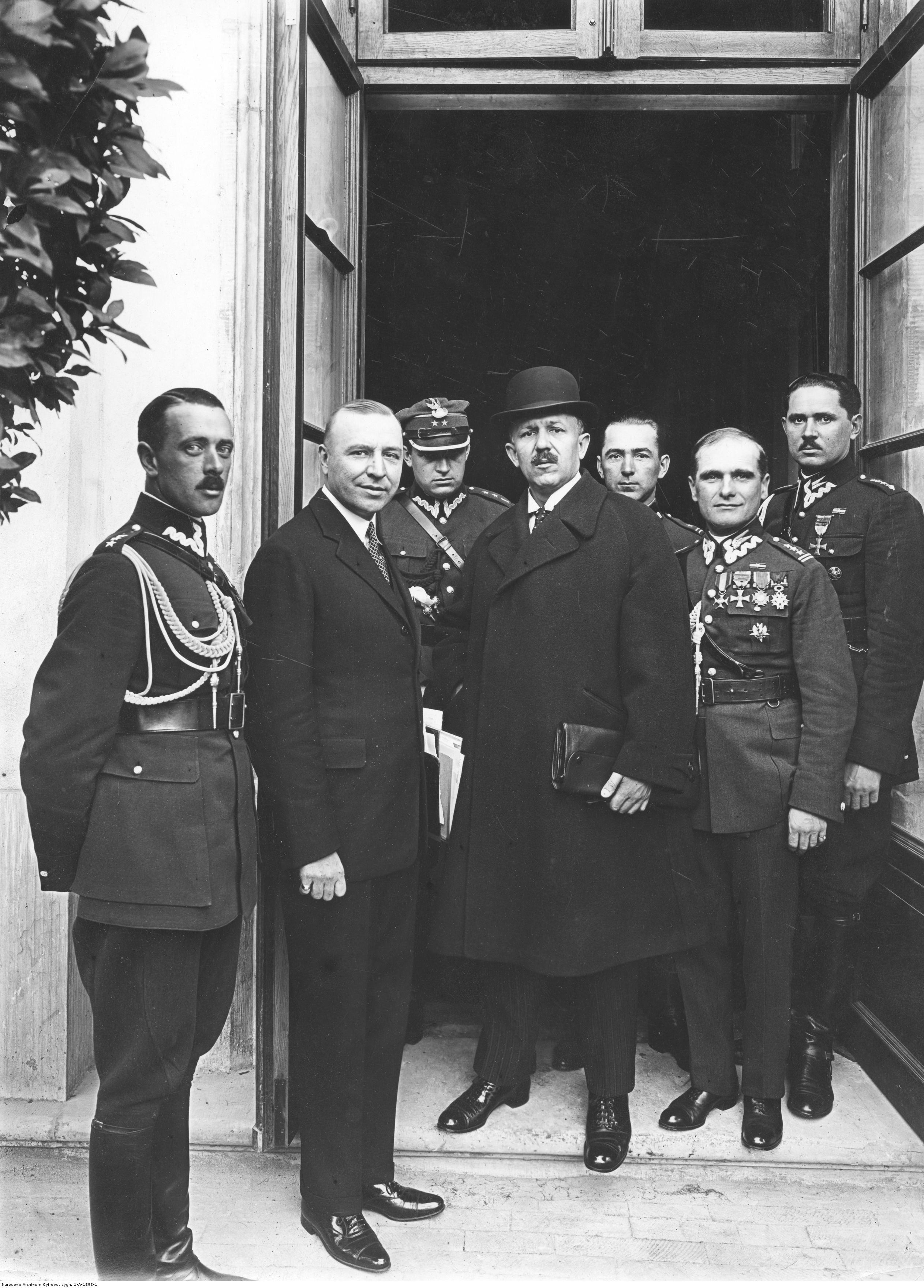 Zaprzysiężenie gabinetu Józefa Piłsudskiego. Członkowie gabinetu po zaprzysiężeniu. Widoczni m.in. szef Kancelarii Cywilnej Prezydenta RP Stanisław Car (2. z lewej), minister wyznań religijnych i oświecenia publicznego i wicepremier Kazimierz Bartel (w meloniku), szef Gabinetu Wojskowego Prezydenta RP pułkownik Sergiusz Zahorski (2. z prawej), kapitan Tadeusz Nagórny (1. z lewej), dowódca 3 szwadronu 1 Pułku Szwoleżerów rtm. Kazimierz Jurgielewicz (1. z prawej), mjr Wojciech Fyda (3. z prawej). Koncern Ilustrowany Kurier Codzienny - Archiwum Ilustracji. Sygnatura: 1-A-1893-1